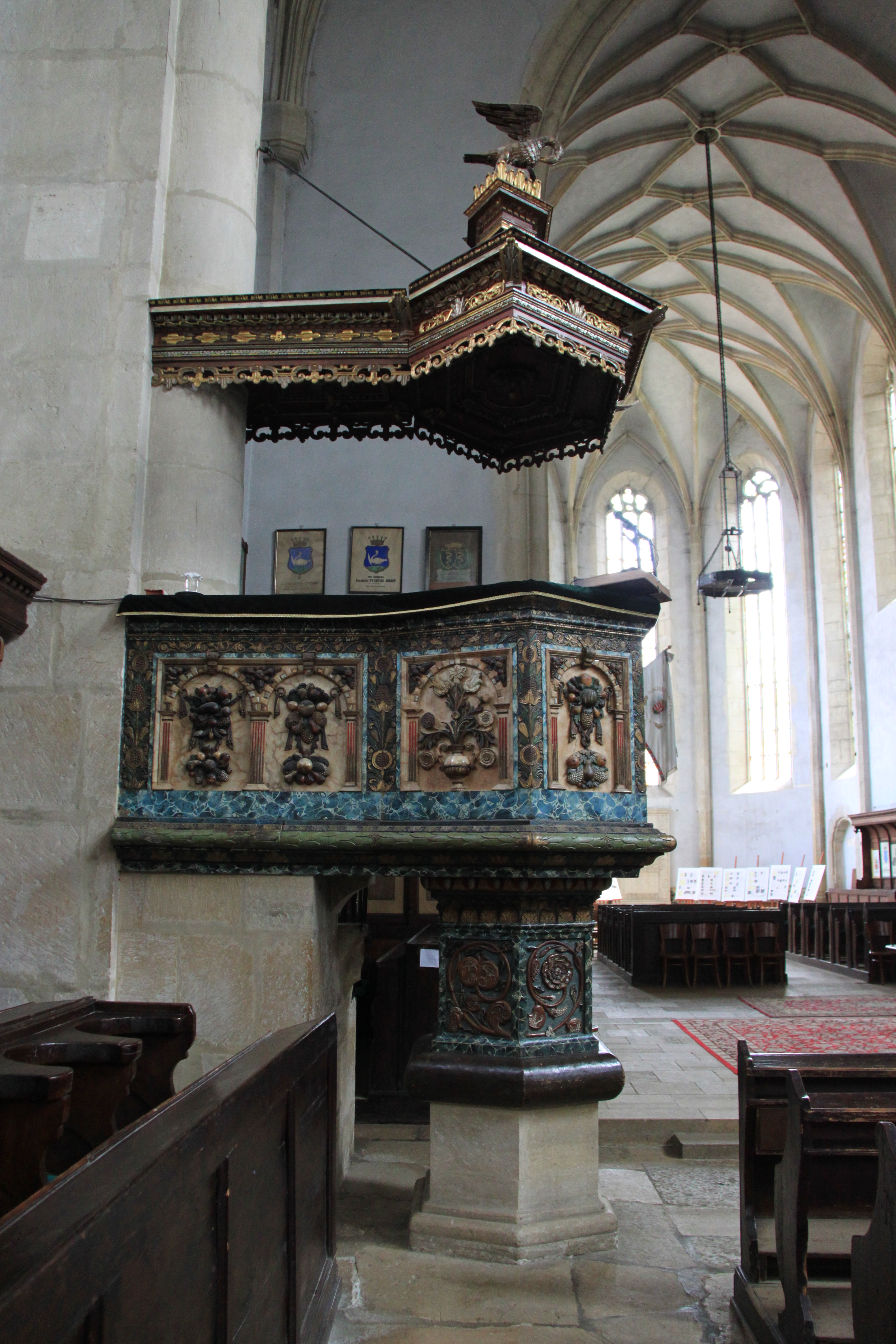 Cluj-Napoca - Iunie 2010